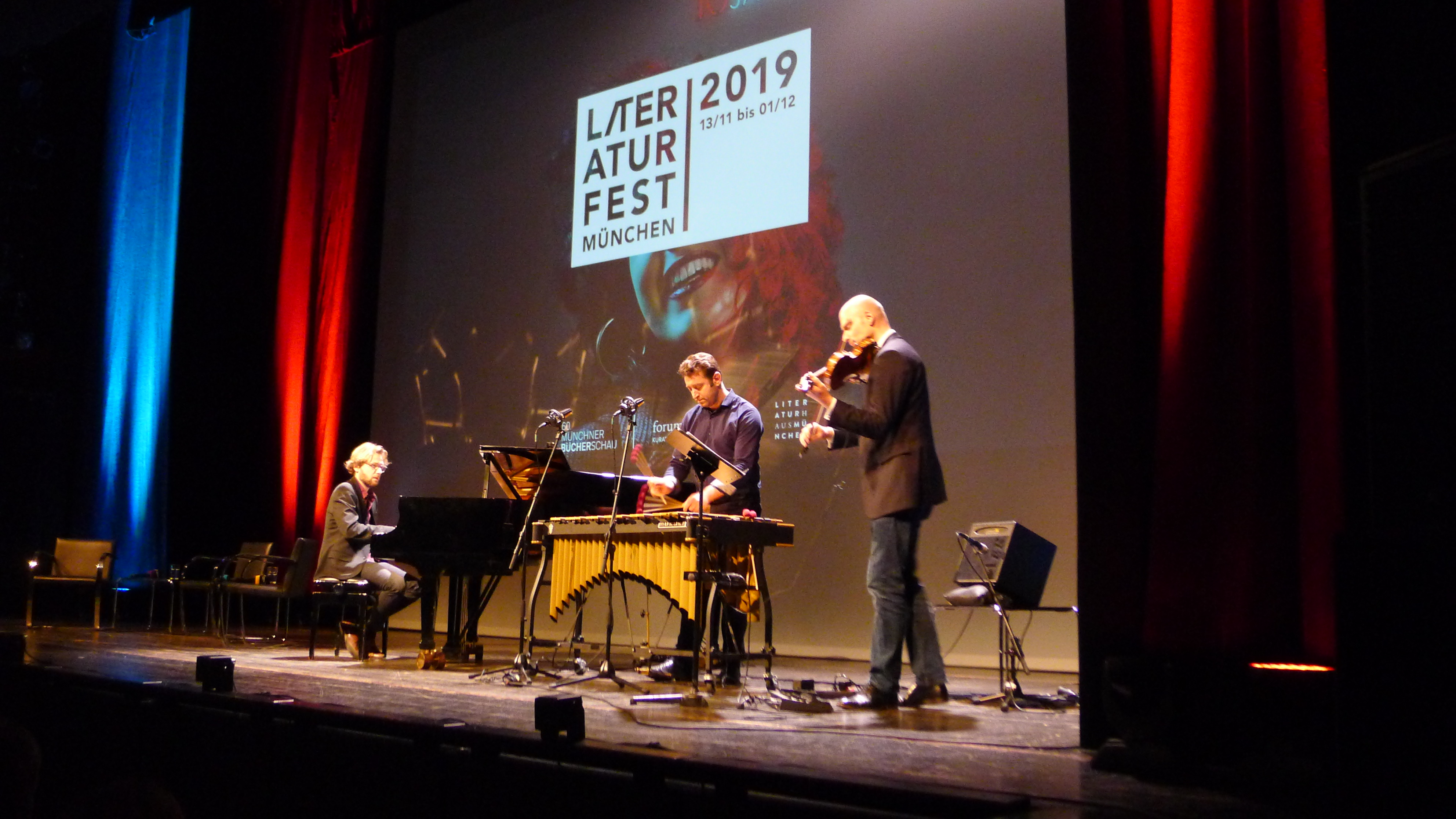 Max Grosch Trio bei der Eröffnung des Literaturfests München. Piano: Matthias Bublath, Vibraphon: Timm Collins, Violine: Max Grosch